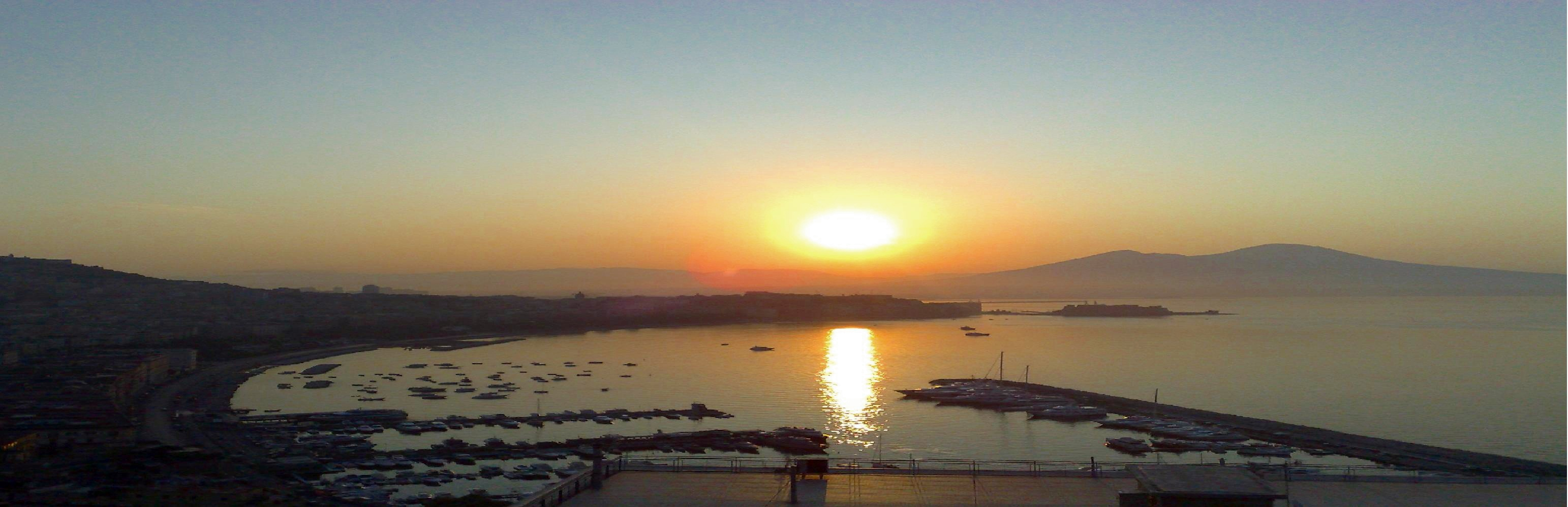 Golfo di Napoli all'alba